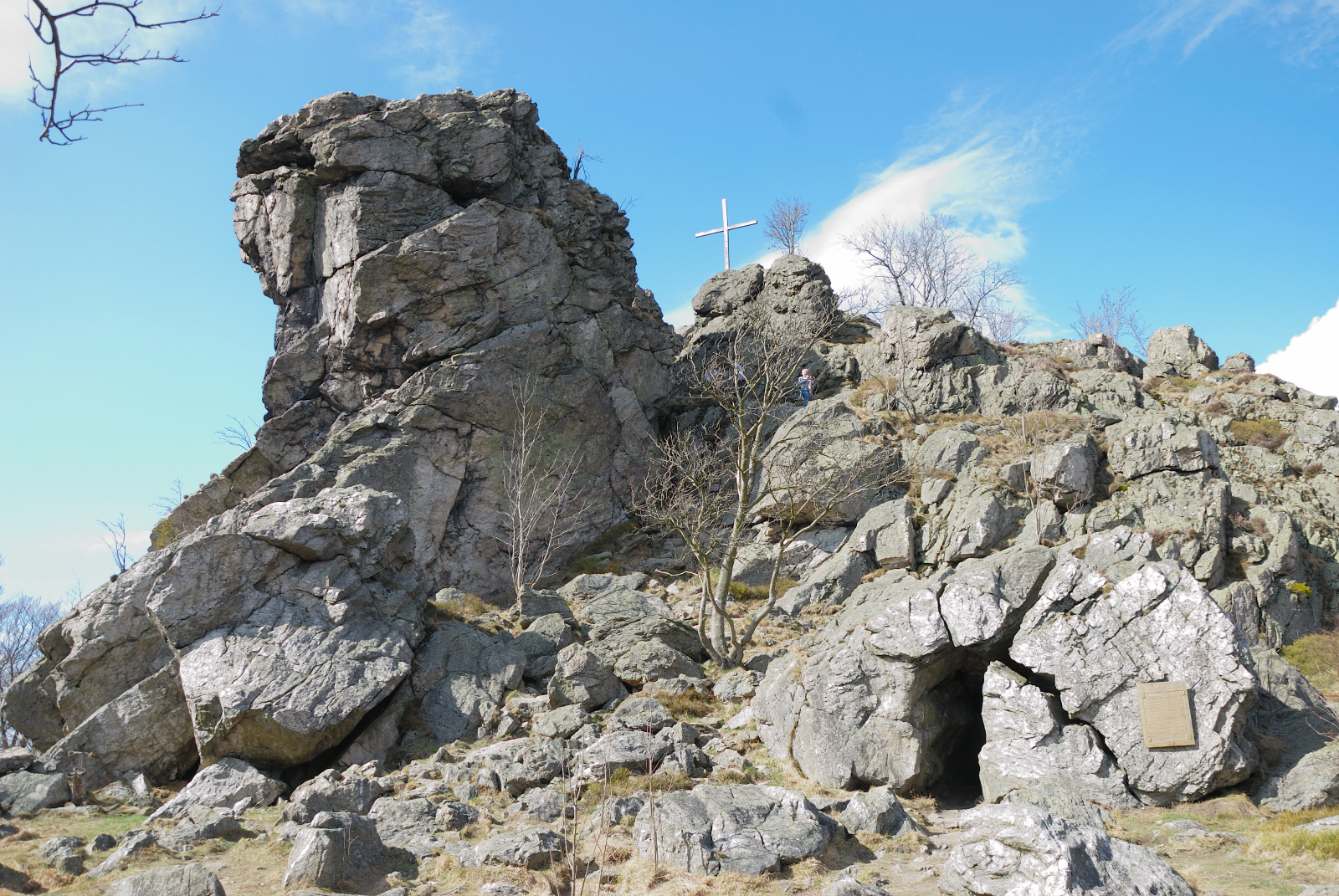 Bruchhauser Steine auf dem Istenberg im Naturschutzgebiet „Bruchhauser Steine“ (NSG HSK-013), Olsberg, Nordrhein-Westfalen